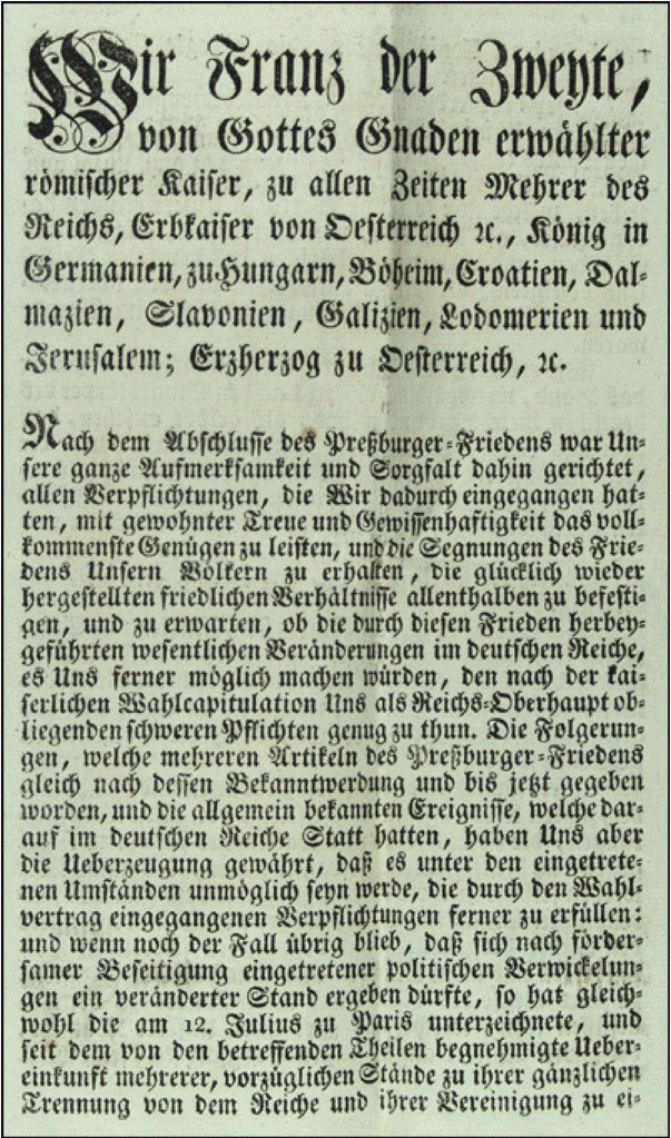 Erklärung des Kaisers Franz II. über die Niederlegung der deutschen Kaiserkrone. – 1806, Aug. 6.